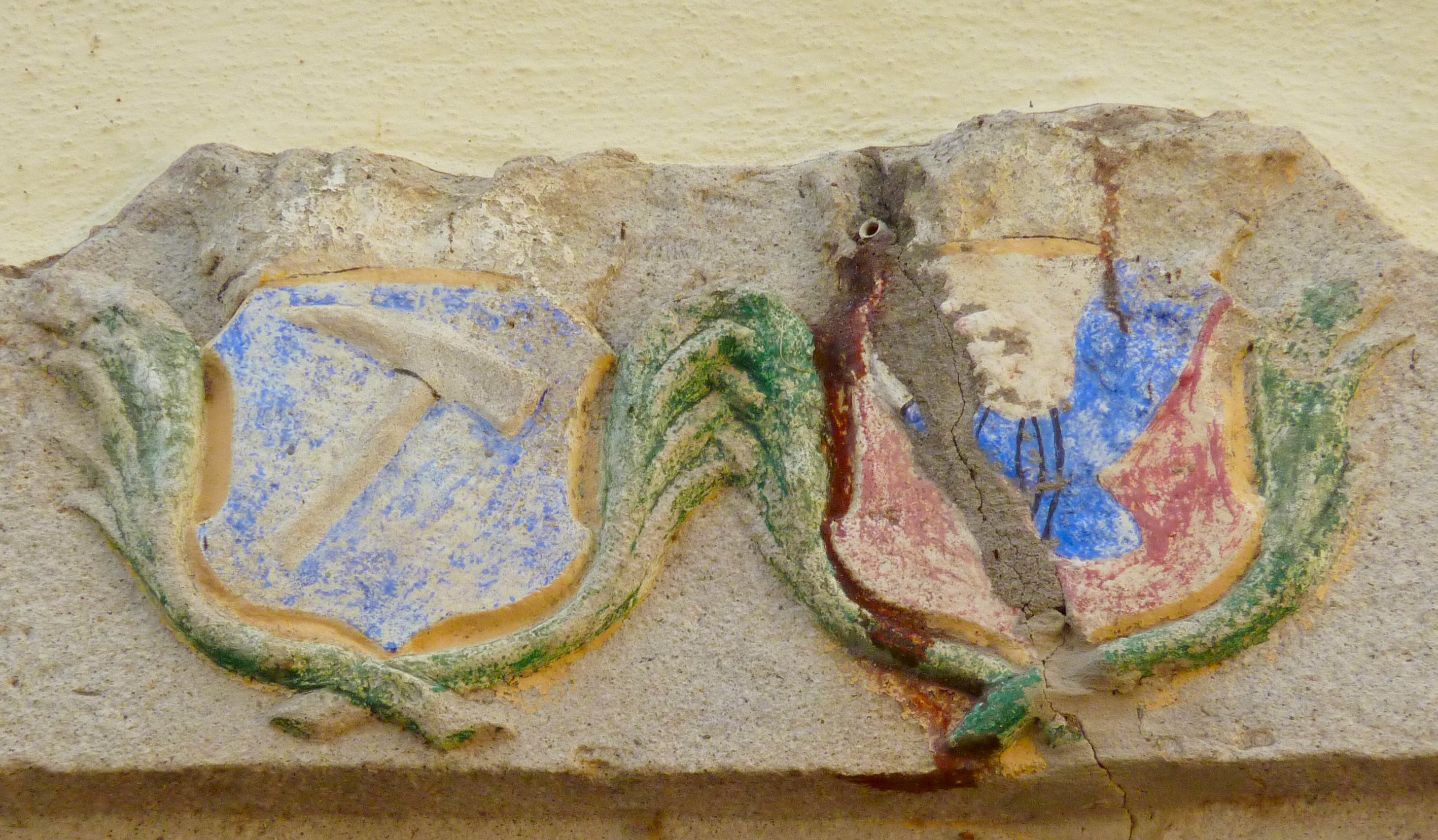 Blankartshof in Ahrweiler, einem Stadtteil von Bad Neuenahr-Ahrweiler (Rheinland-Pfalz), ehemaliger Hof der Adelsfamilie Blankart von Ahrweiler, 1680 erbaut, Allianzwappen über dem Eingang; links: Wappen der Familie Blankart (Hammer), rechts: vermutlich Wappen der Amalia Regina Freiin von Waldenburg (Schenkeren zu Untersbach, † 1694)